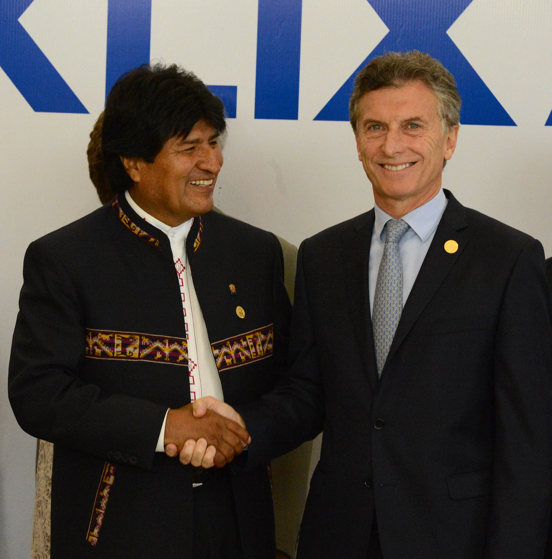 El presidente Mauricio Macri saluda a su par de Bolivia, Evo Morales, en la previa de la foto oficial de la 49° Cumbre del Mercosur, en Paraguay.